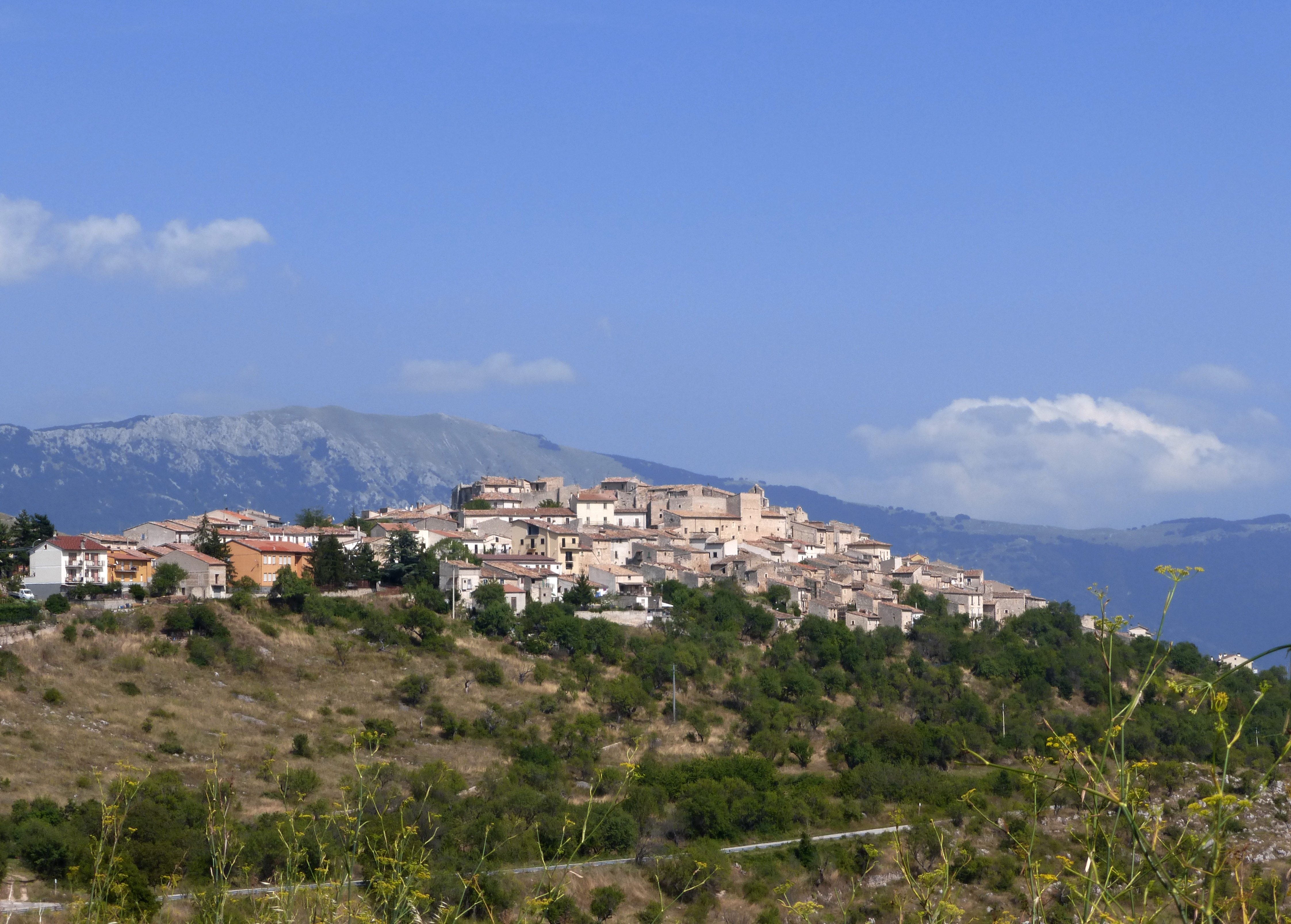 Veduta di Castelvecchio Calvisio, L'Aquila.